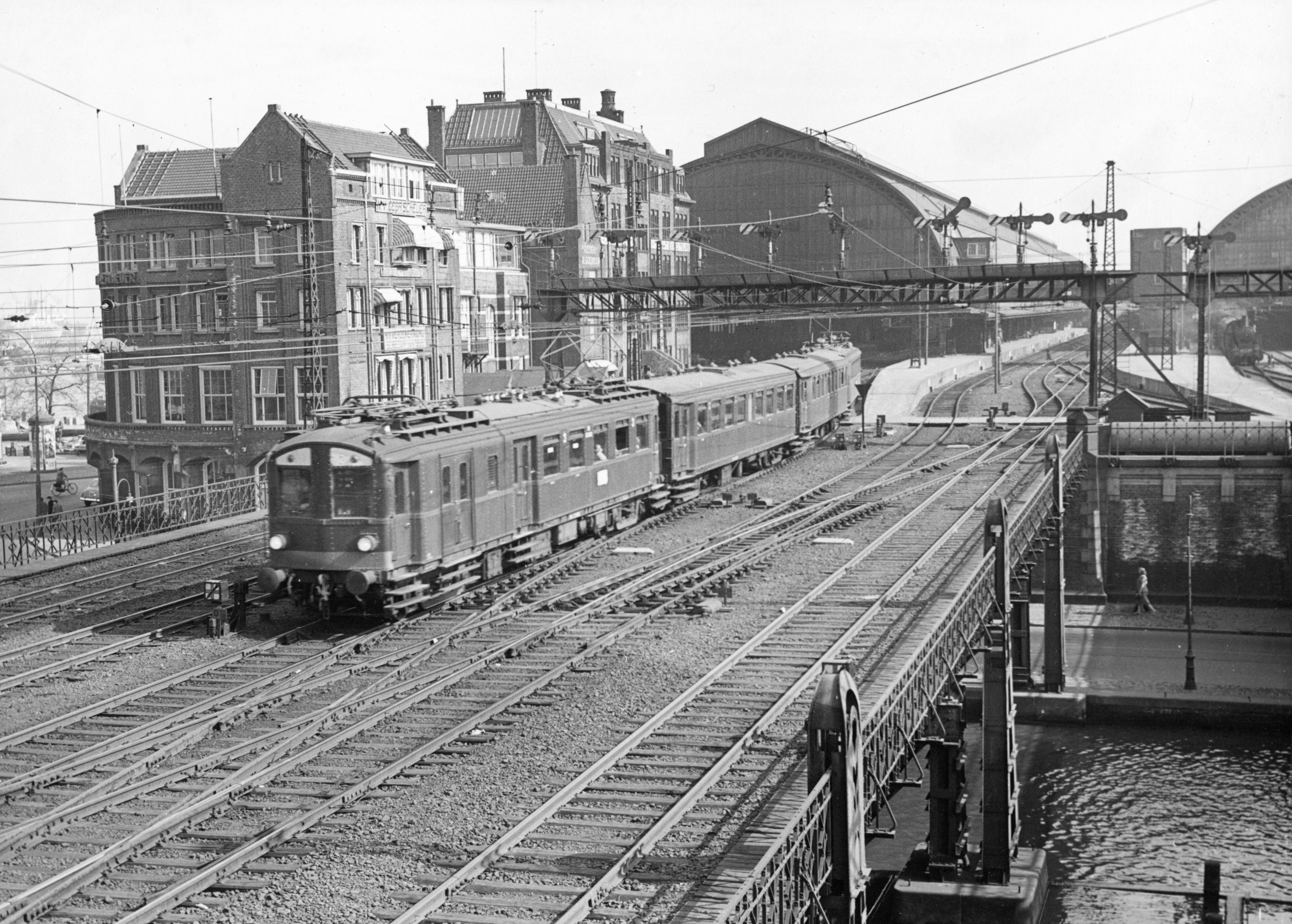 Afbeelding van een trein bestaande uit rijtuigen electrisch buffermaterieel ("blokkendozen", mat. 1924) van de N.S. bij het N.S.-station Amsterdam C.S. Amsterdam.